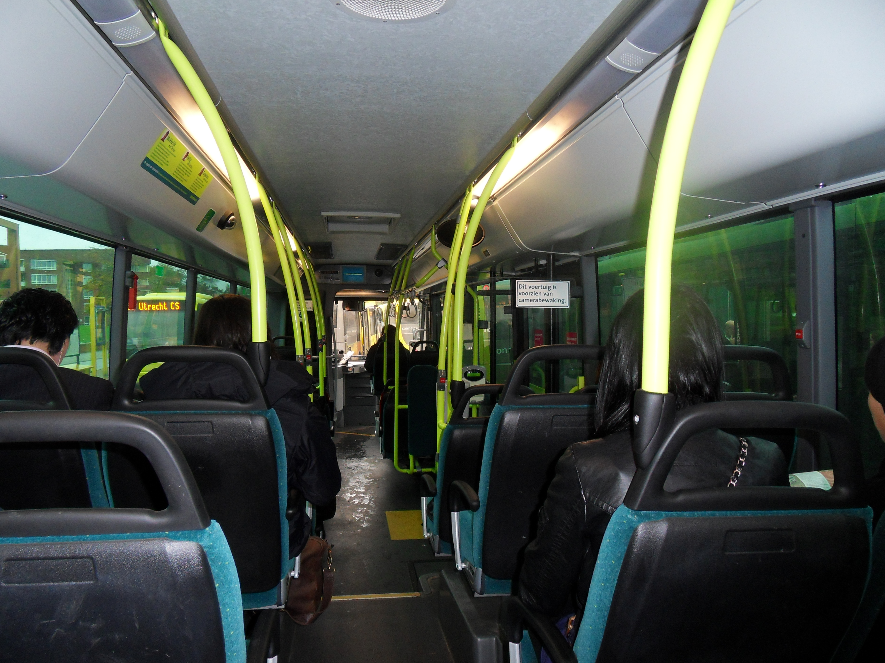 In een bus van Connexxion. Toen ik deze foto nam, stond de bus vast tussen allemaal andere bussen. De foto is in Zeist genomen.